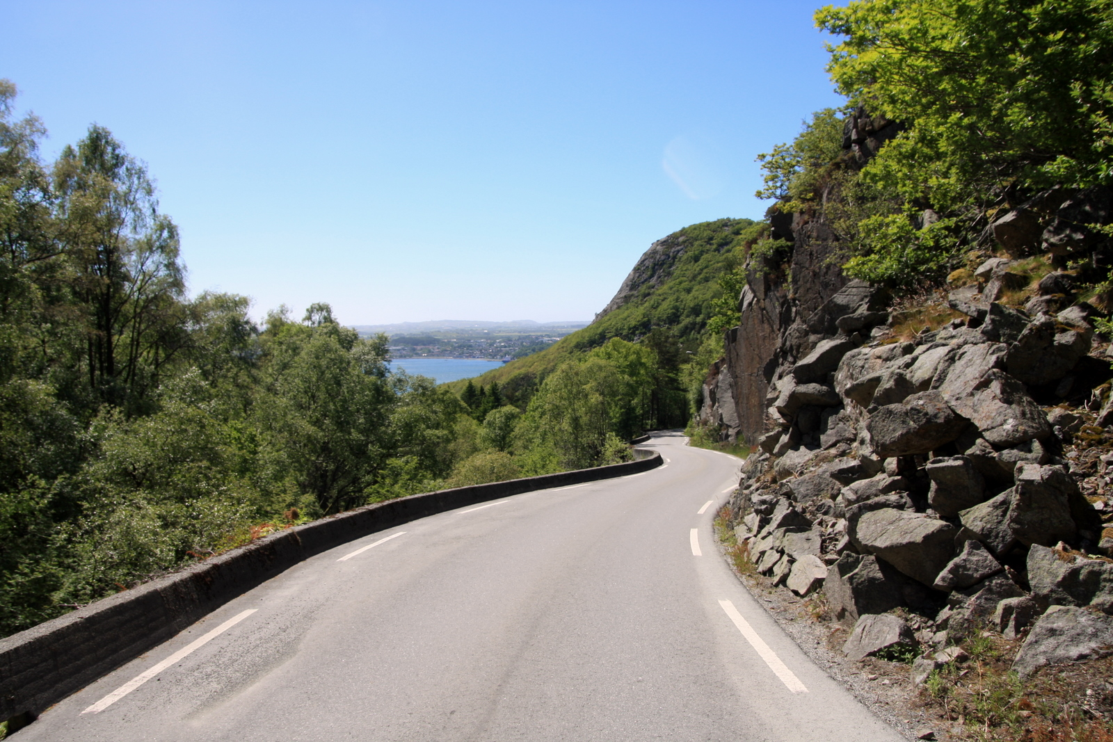 Fylkesvei 338 Fjogstadveien